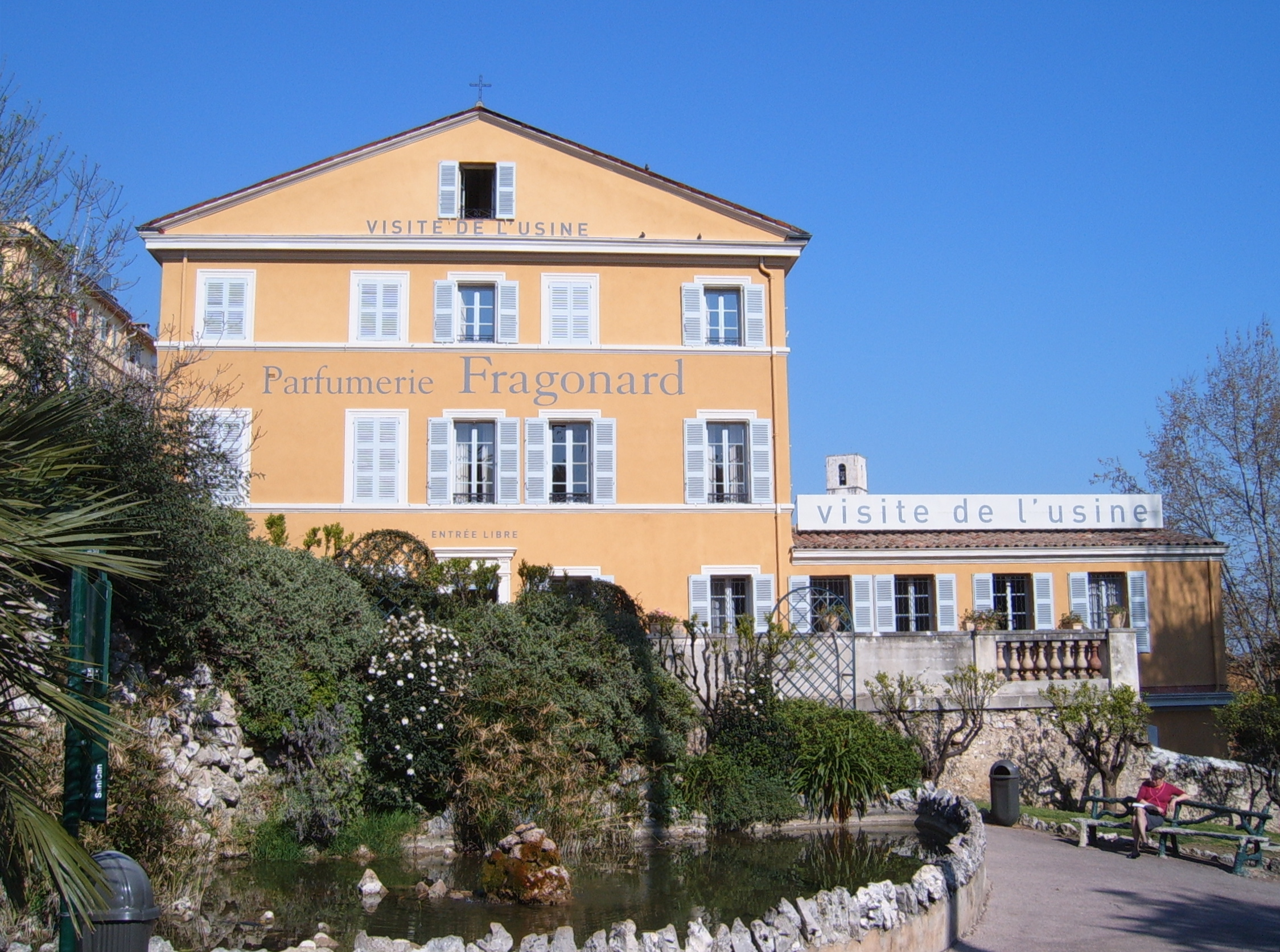 Parfumerie Fragonard, Grasse (Côte d'Azur, France)